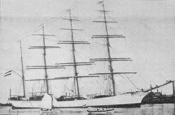 Stählerne Viermastbark „Herzogin Sophie Charlotte“, die 1894 als „Albert Rickmers“ für die Rickmers Reederei auf der Rickmerswerft in Geestemünde gebaut wurde. 1927 abgewrackt.